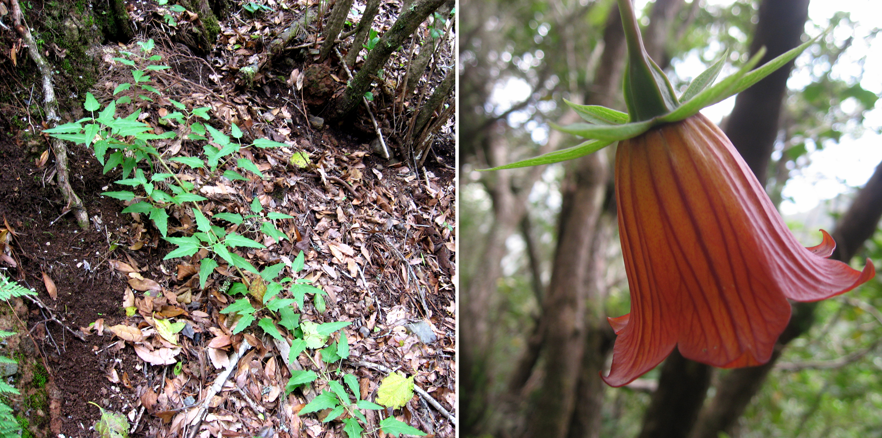 Canarina canariensis en su hábitat natural: bosque de laurisilva de Anaga, Tenerife, Islas Canarias